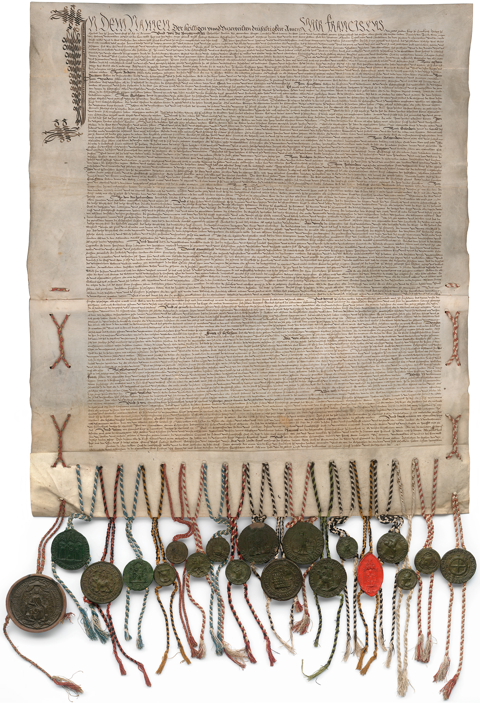 Exemplaire en allemand de la paix perpétuelle de 1516, traité conclu entre François Ier, roi de France, et les cantons suisses, portant les sceaux du roi, des cantons et de leurs alliés.